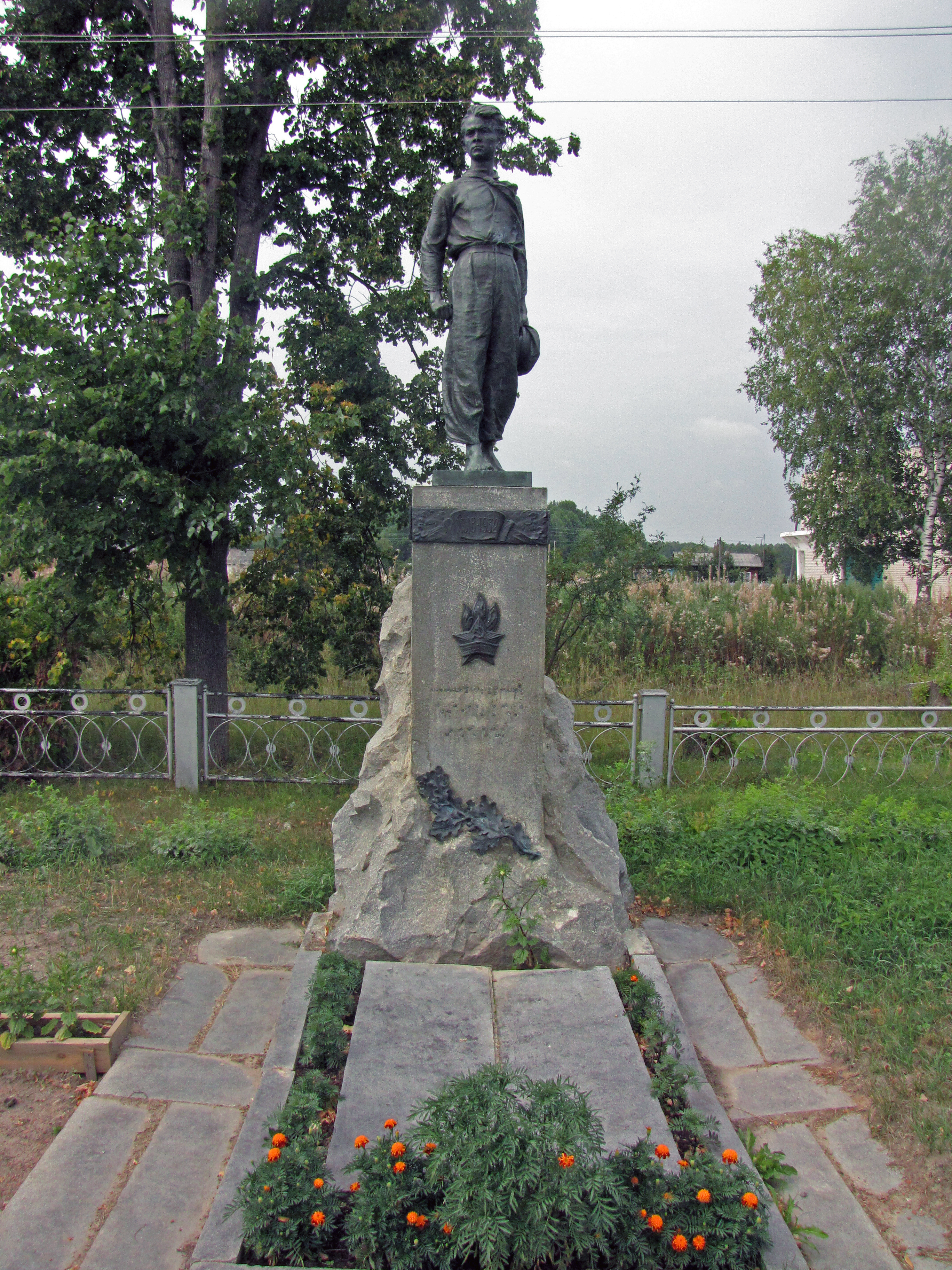 Памятник Павлику Морозову в деревне Герасимовка